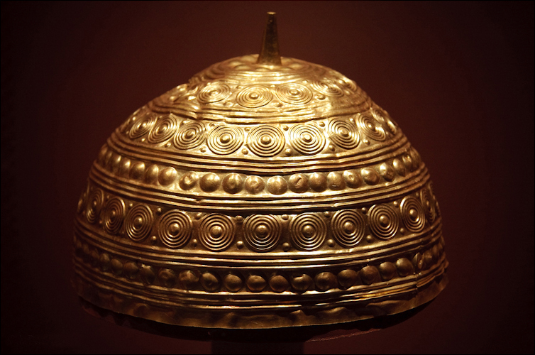 Casco de Leiro no Museo Arqueolóxico do castelo de San Antón, A Coruña.